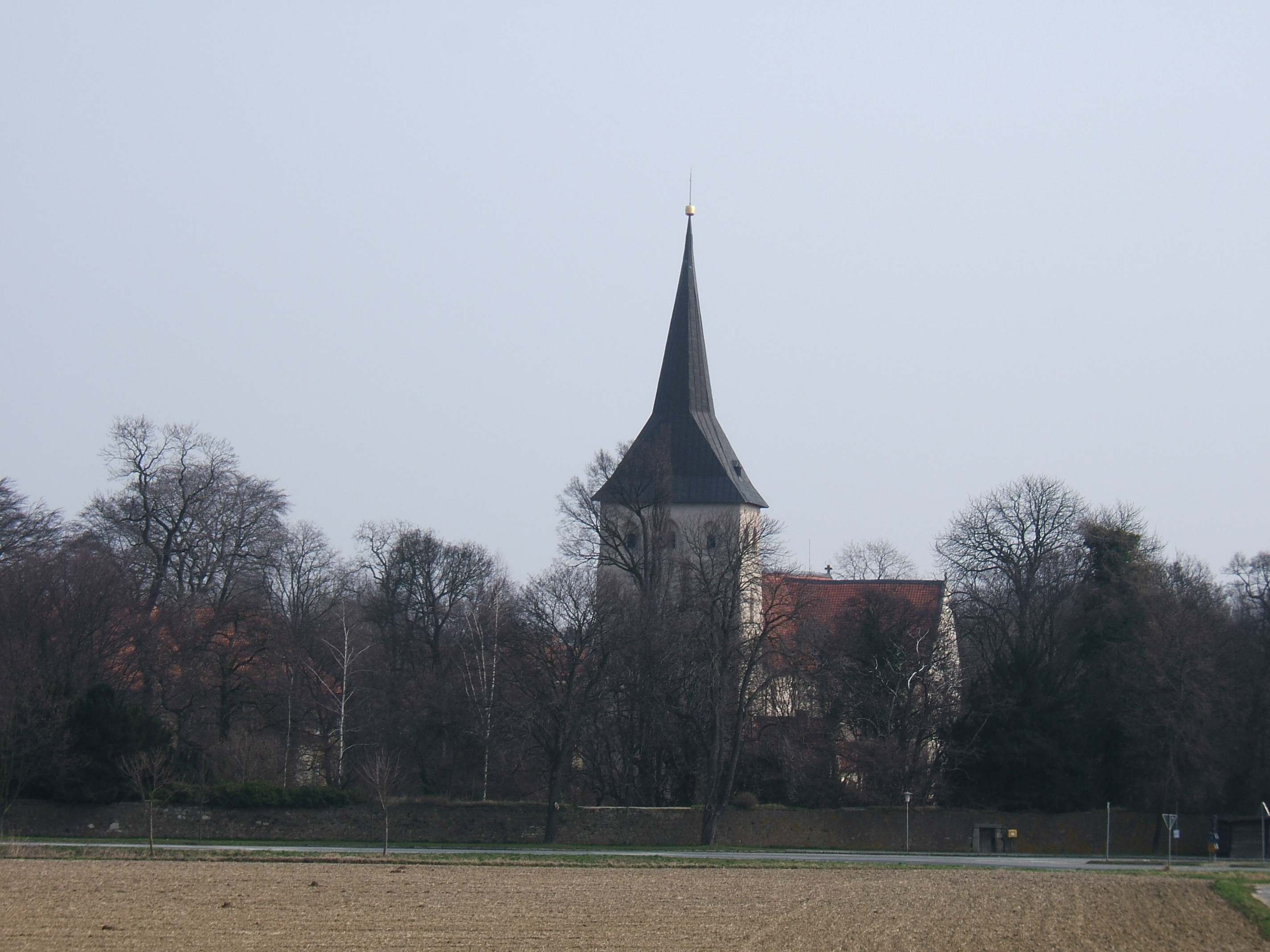 Die katholische Kirche aus dem 12. Jahrhundert in Heiningen.